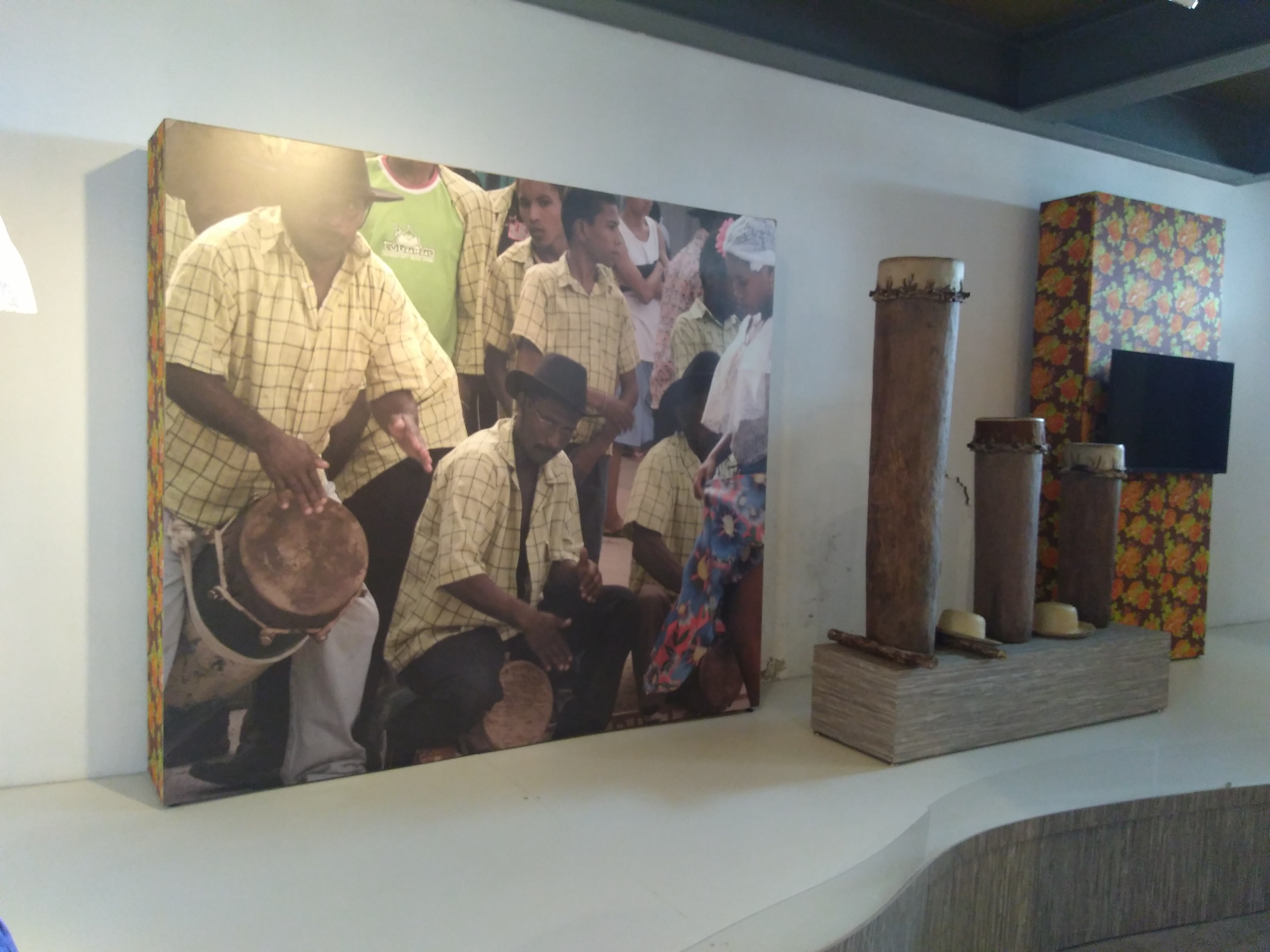 Parte exterior e exposições da Casa do Tambor de Crioula, espaço cultural destinado à preservação memória das manifestações populares de origem afro-brasileiras da cidade São Luís, MA